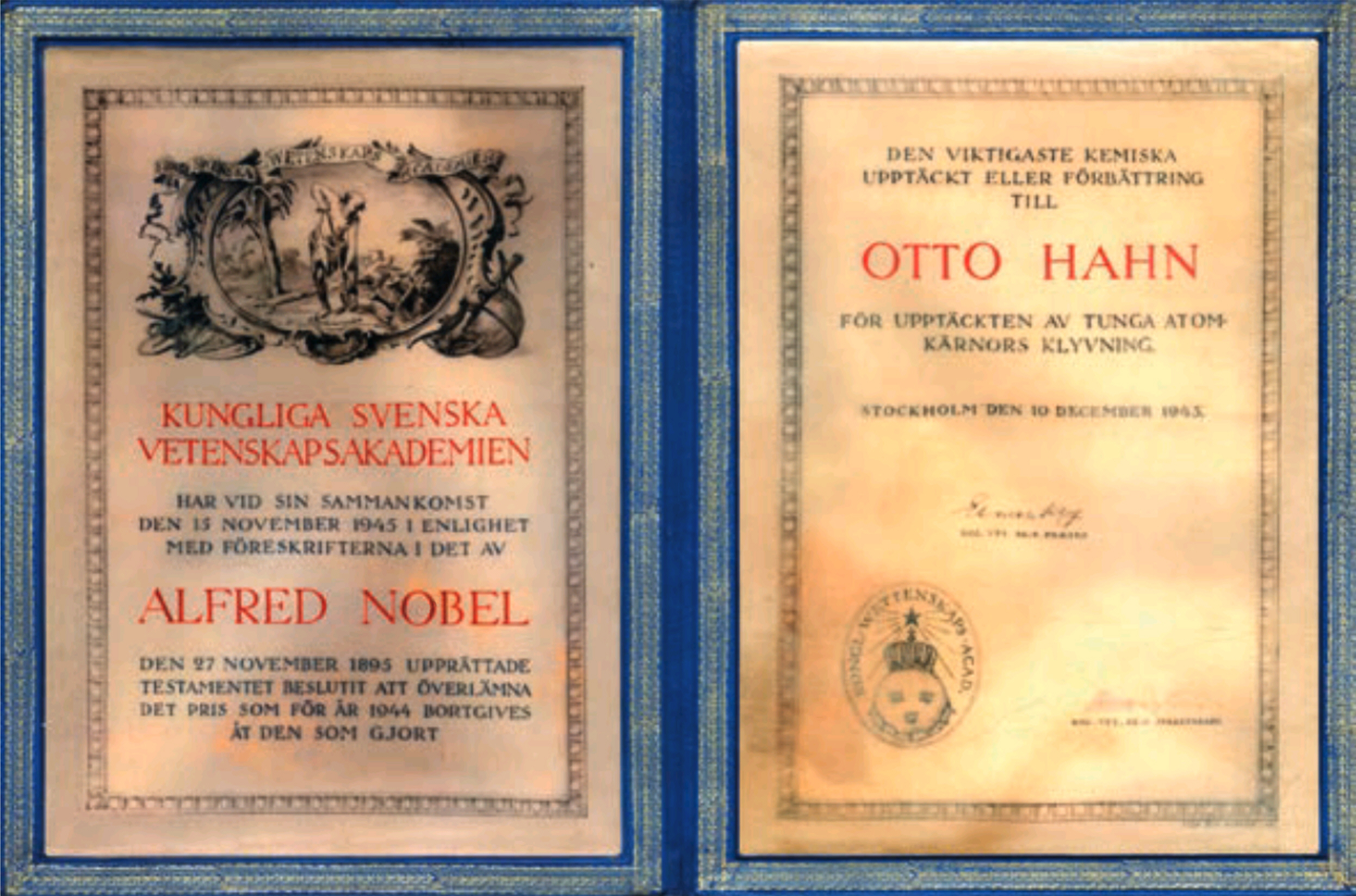 Otto Hahn – Nobel-Preis für Chemie (die Uranspaltung)